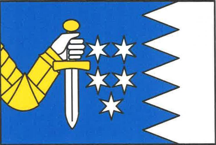 Nejepín vlajka